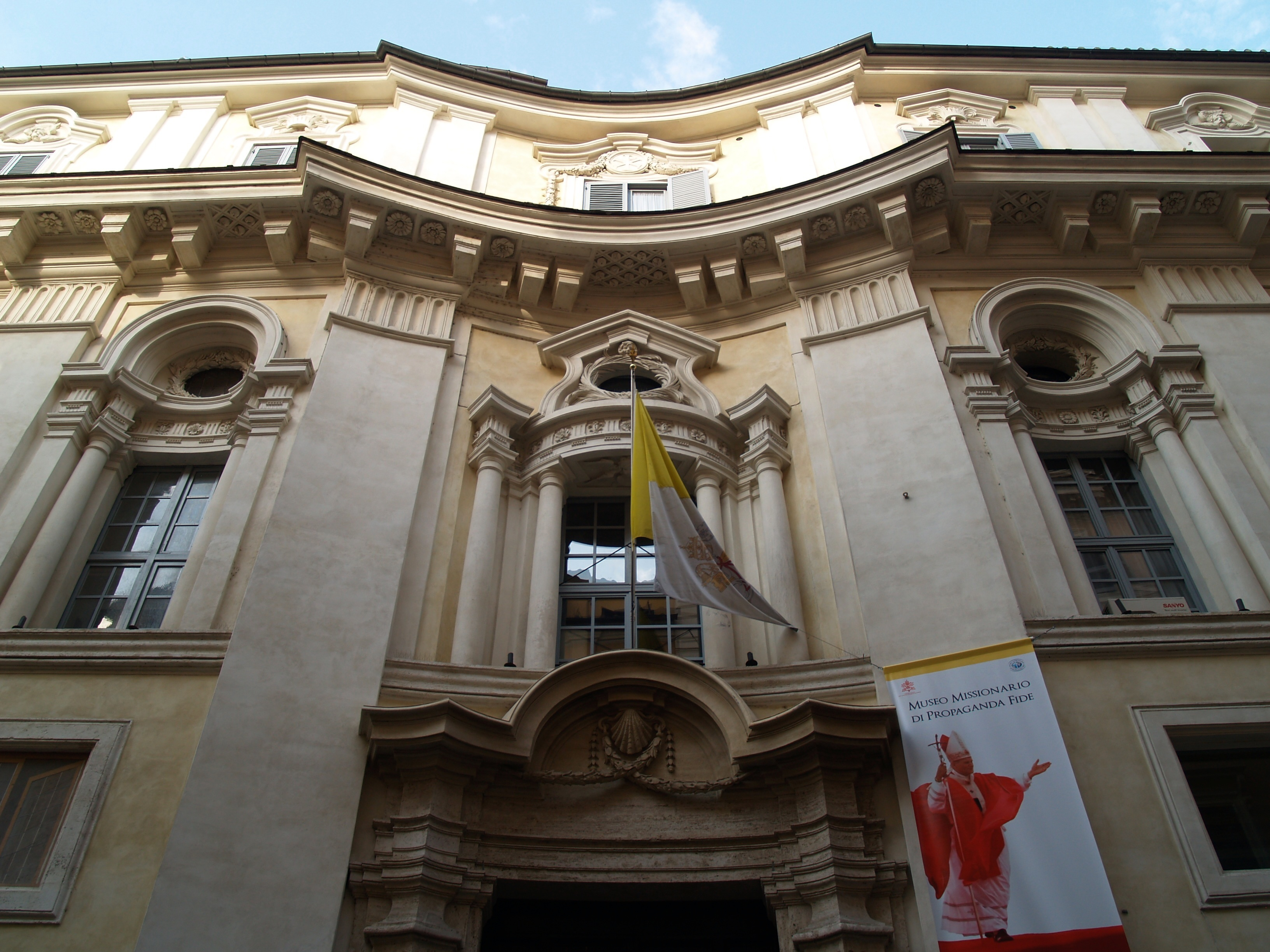 Roma. Palazzo di Propaganda Fide. Fachada de Francesco Borromini.